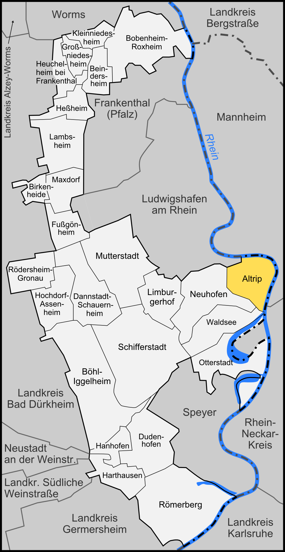 Karte der Gemeinde Altrip im Rhein-Pfalz-Kreis